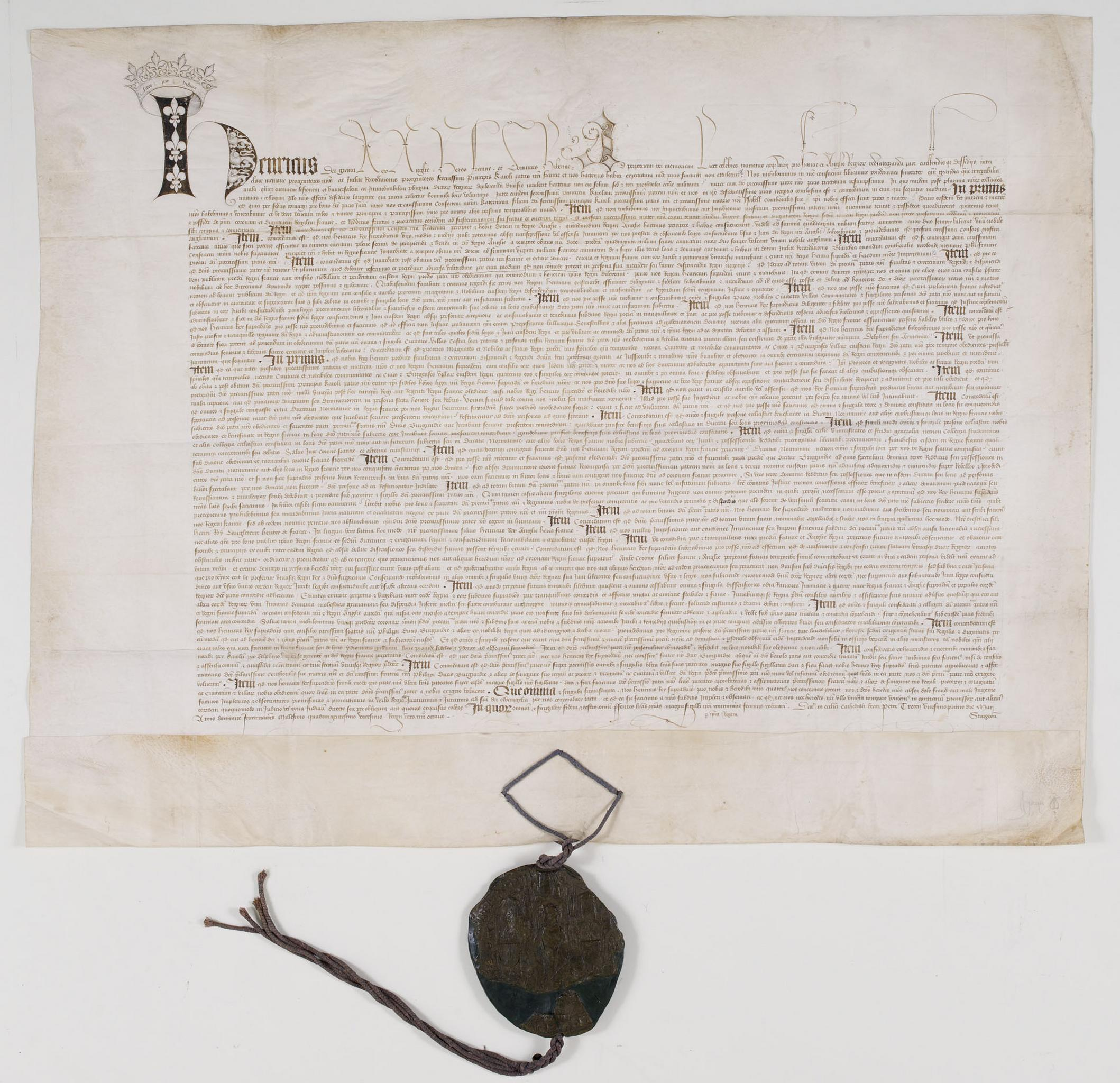 Договор в Труа пергамент